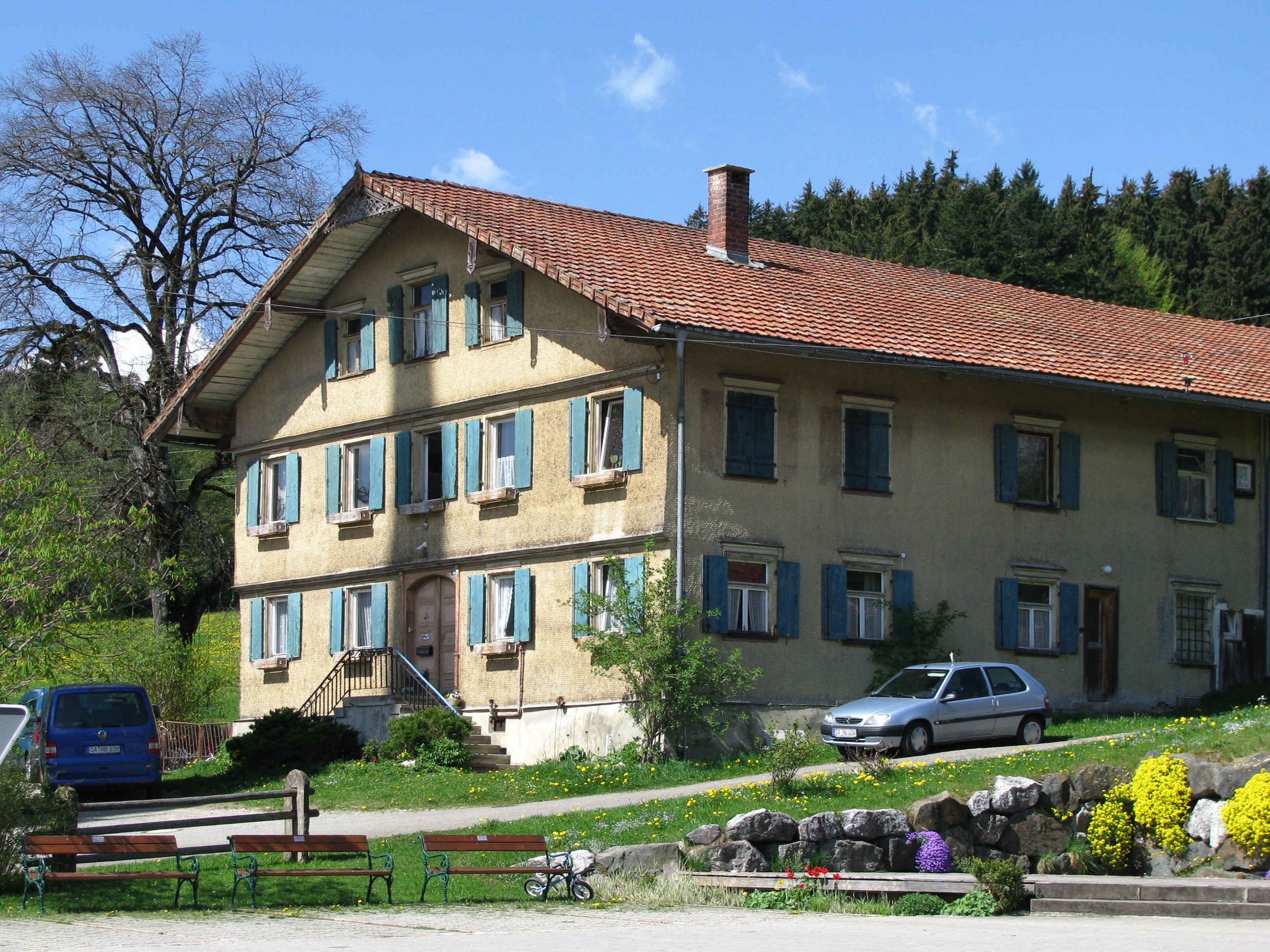 Vorderburg, Kirchdorfer Straße 16; Pfarrhaus, zweigeschossiger, verschindelter Blockbau mit Flachsatteldach, 1712, Dach 1865.